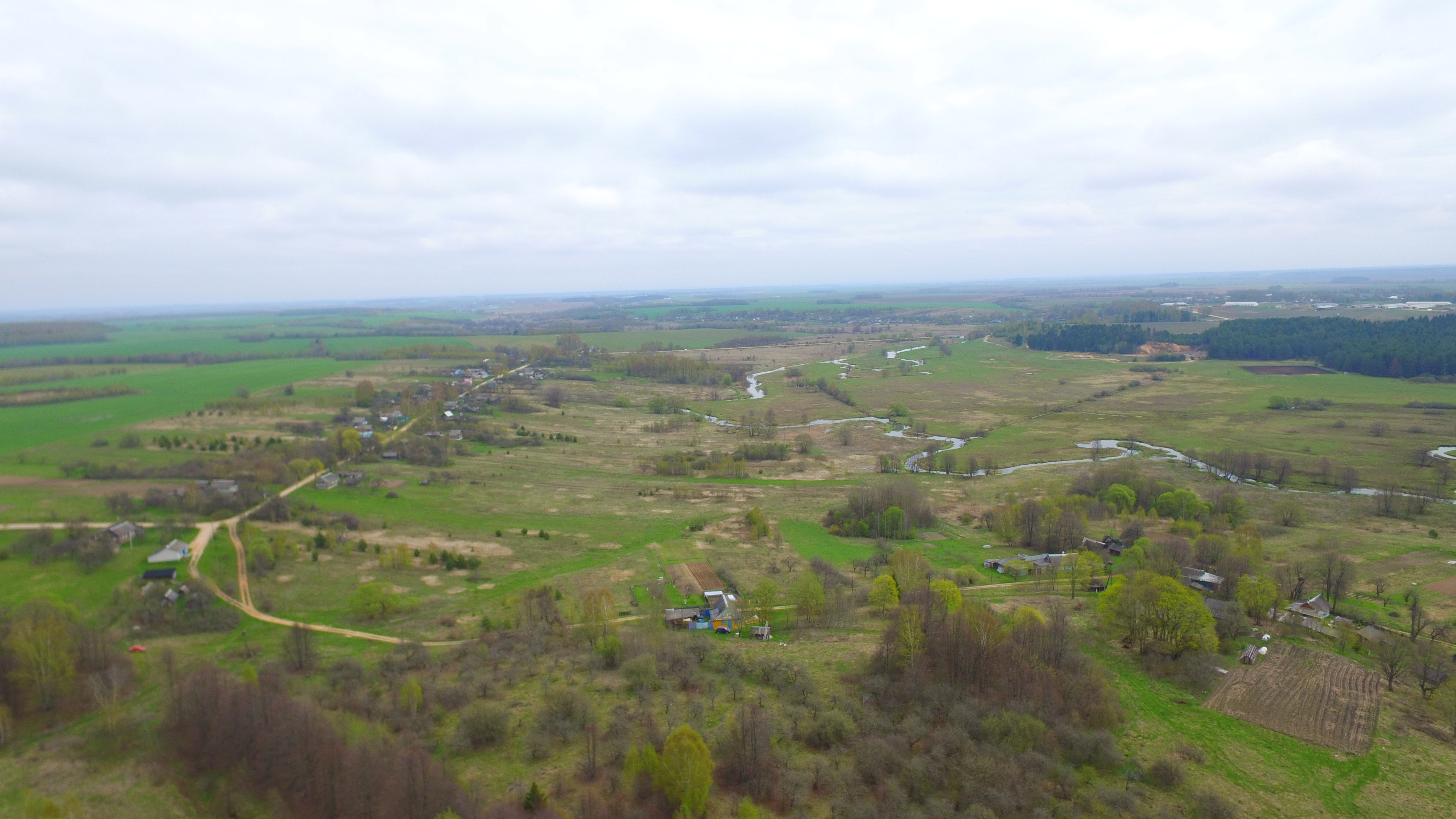 Деревня Пральня и река Вабич